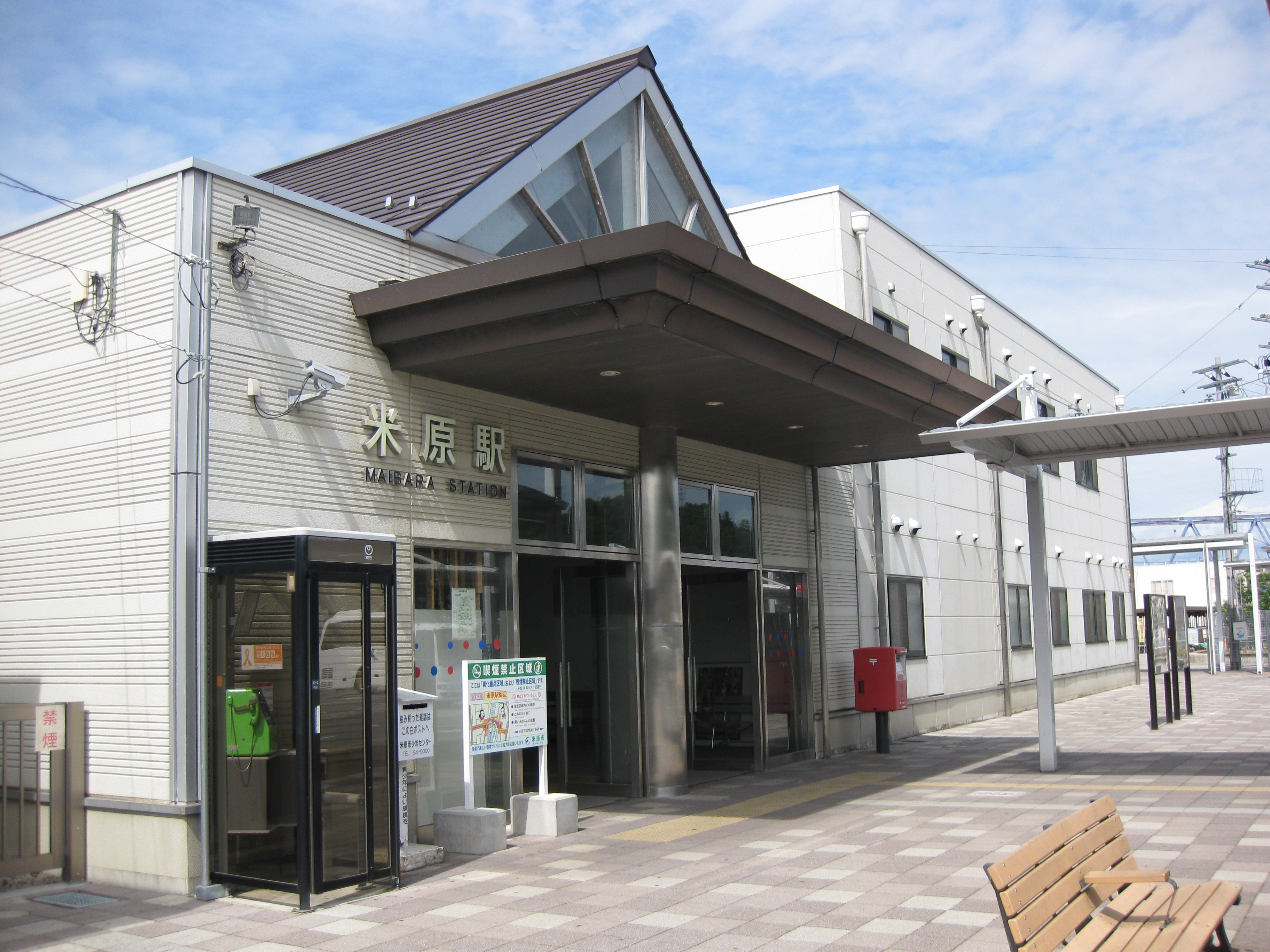 米原駅東口